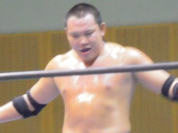 KAZMA 2010年8月15日 KAIENTAI-DOJO千葉ポートアリーナ大会 投稿者撮影